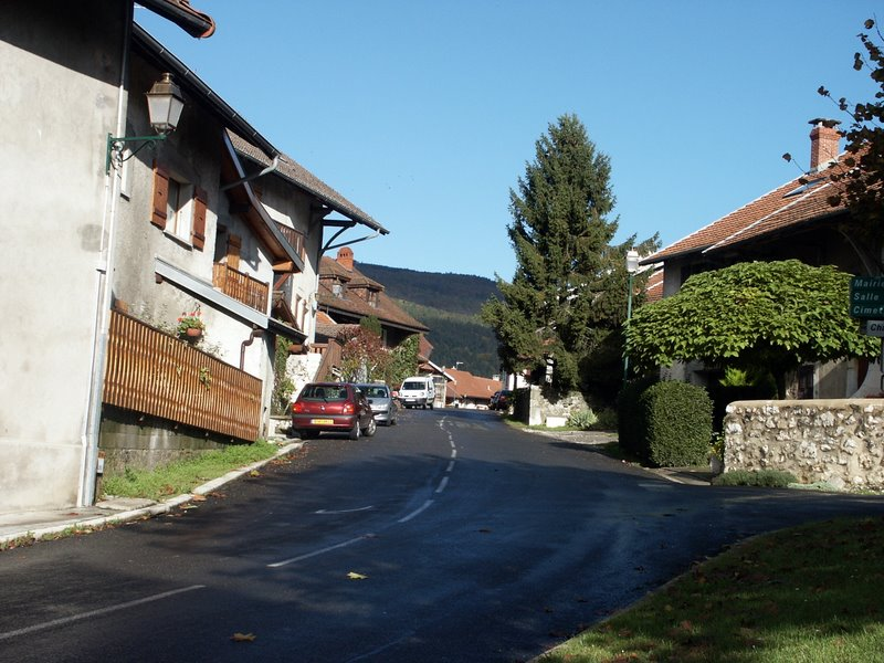 Apercu du village de Villes